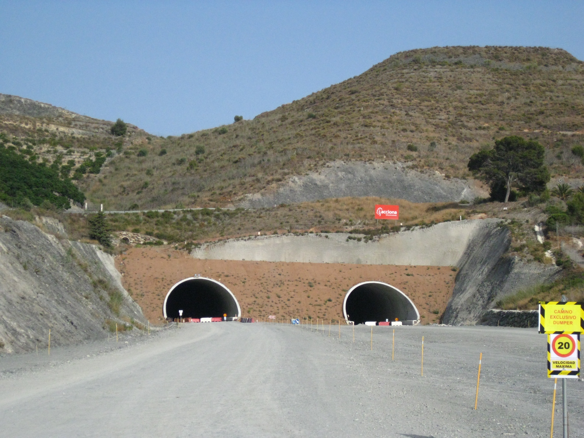 Túneles para el paso de la autovía A-7 cerca de Motril. Junio de 2012